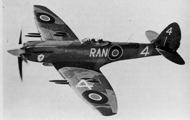 Supermarine Spitfire F.22, 607 Squadron RAF.